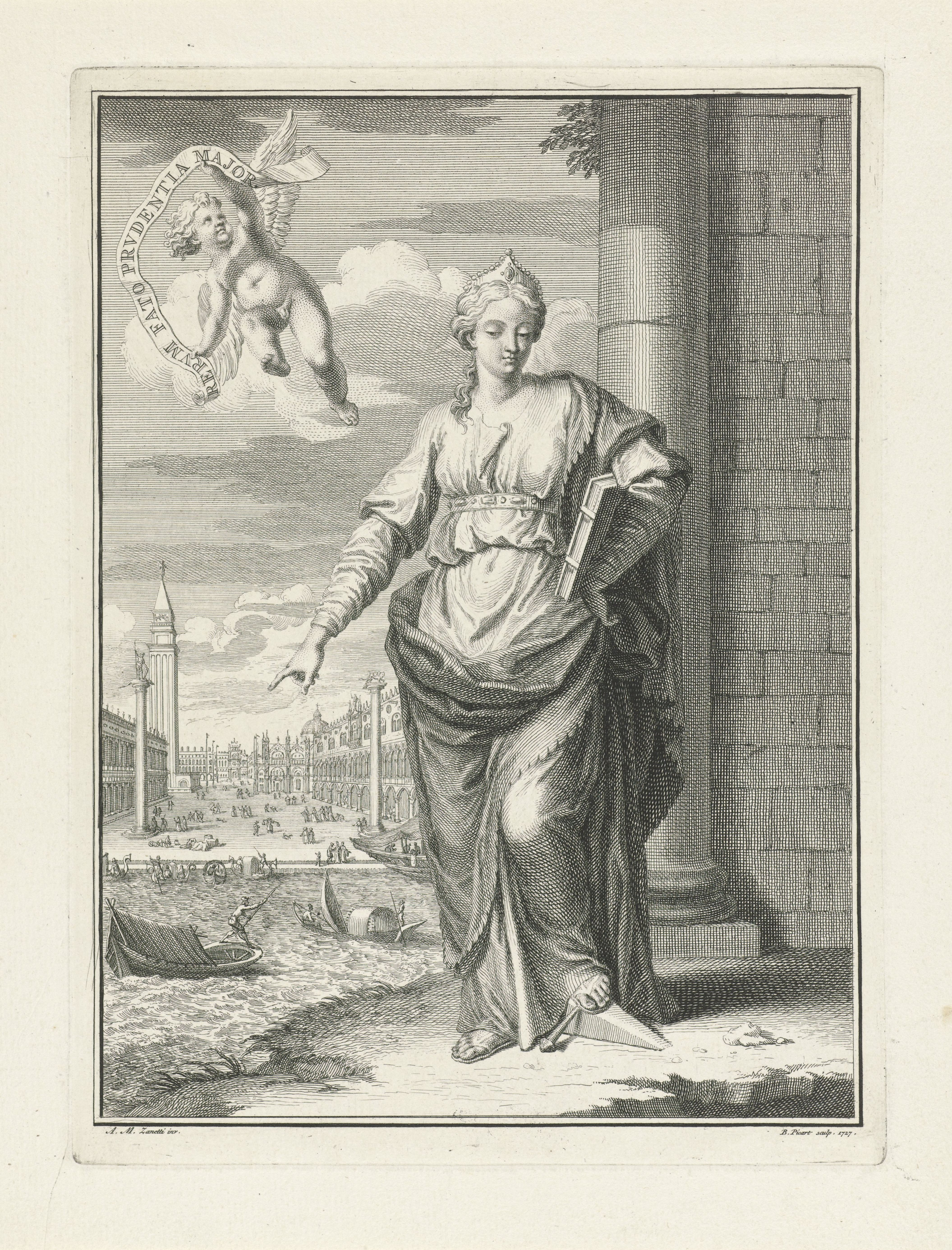 Een gekroonde vrouw (Voorzichtigheid?), met een boek onder de arm, wijst op de aarde. Aan haar voeten een wig en een nagel. In de lucht een putto met een banderol waarop een opschrift in het Latijn. Op de achtergrond een gezicht op het San Marcoplein te Venetië. Creator: Picart, Bernard (Picart, Bernard) From: 1673-06-11— To: 1733-05-08 Coverage: second quarter 18th century; tweede kwart 18e eeuw Geographic coverage: Amsterdam Date of creation: 1727